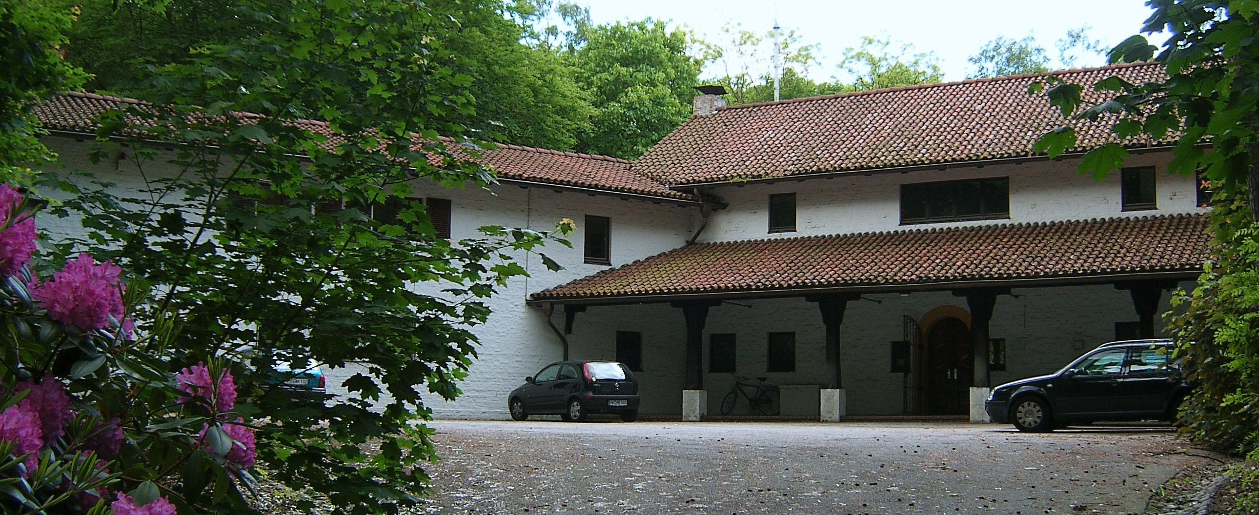 Hamburg-Blankenese, Falkenstein, ehemaliges Gebäude des Instituts für Friedensforschung und Sicherheitspolitik